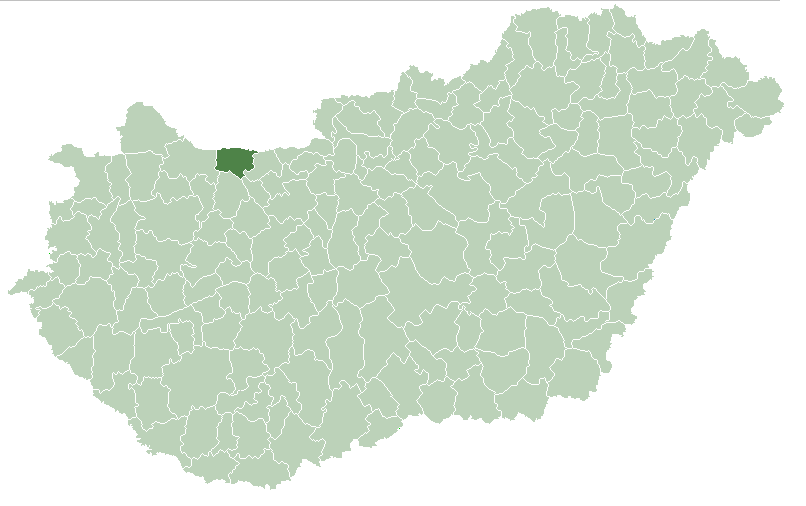 Poloha okresu v rámci Maďarska.